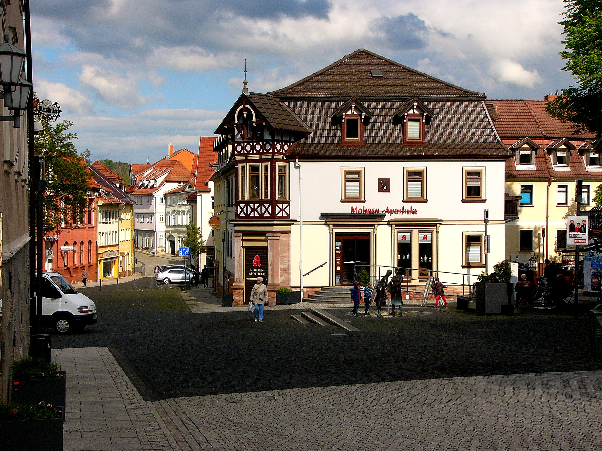 Straßenpartie am Rathaus in Bad Salzungen.